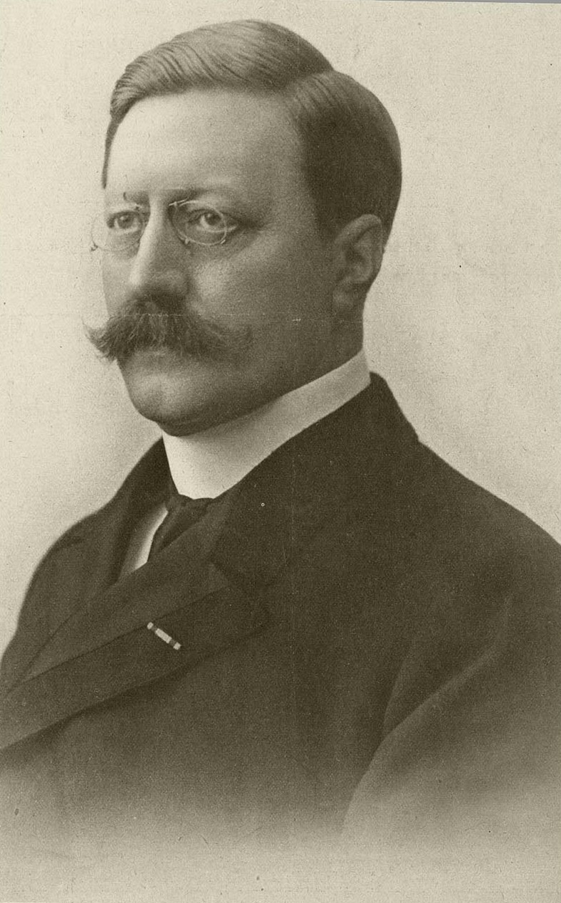 Mr. Joannes Josephus Ignatius Harte van Tecklenburg. Nieuw benoemd lid van den Raad van State.